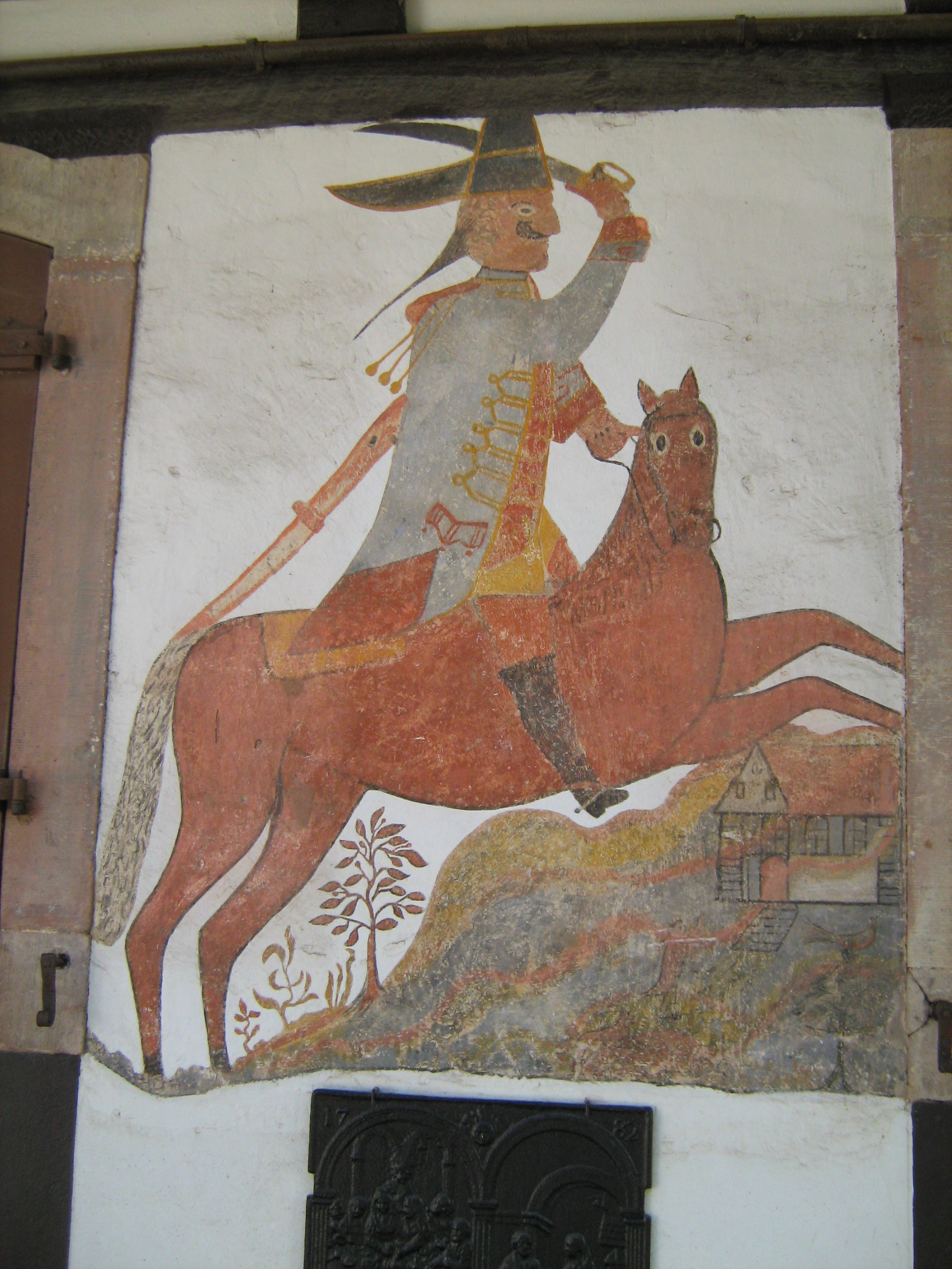 Frasque d'une Maison à colombage à Alteckendorf